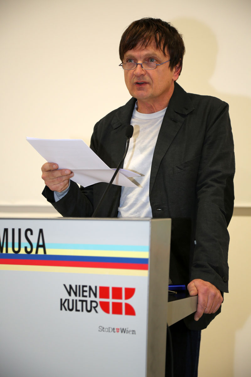 Ferdinand Schmatz-5915